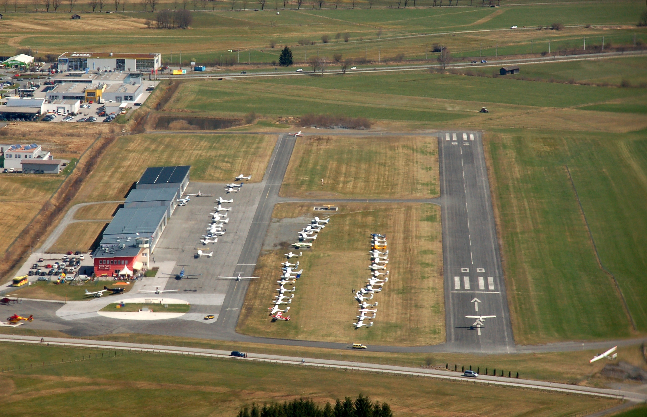 Anflug von Westen